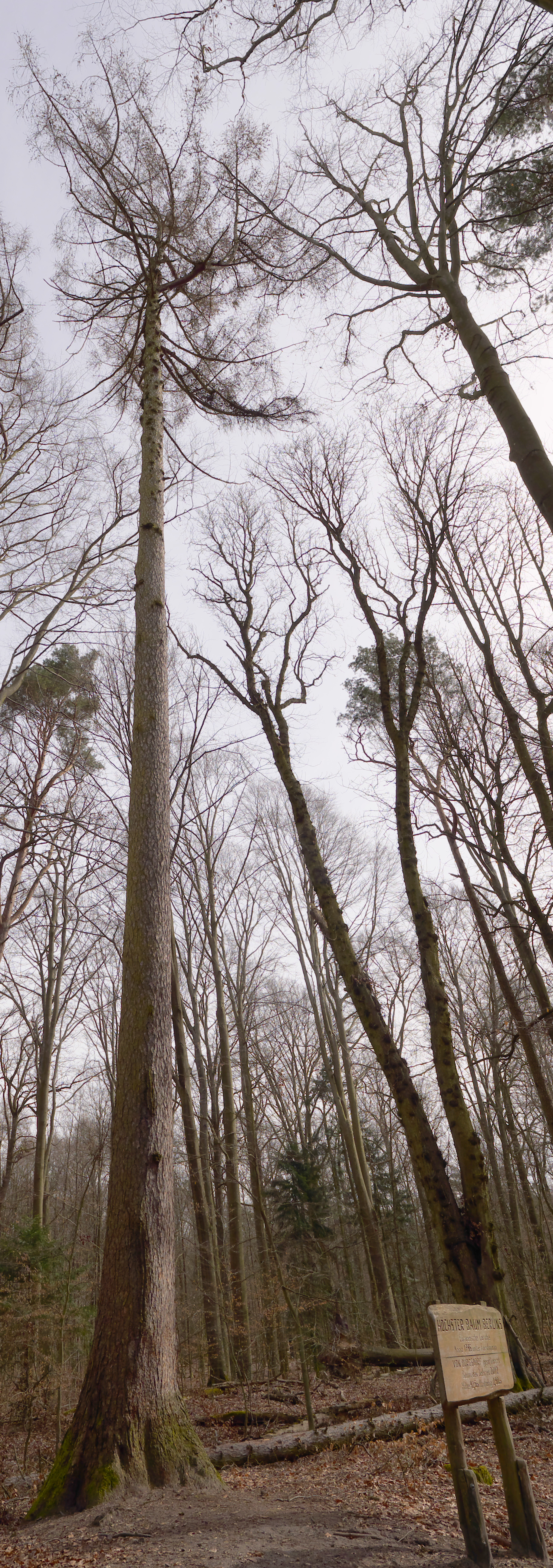 Höchster Baum Berlins, 42,5 Meter hoch, Europäische Lärche, gepflanzt 1795, Baum des Jahres 2012, Stammumfang 2,9 Meter